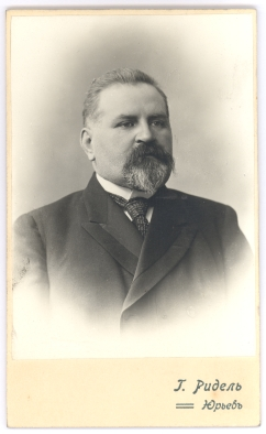 Sergei Dmitrijevitš Mihnov